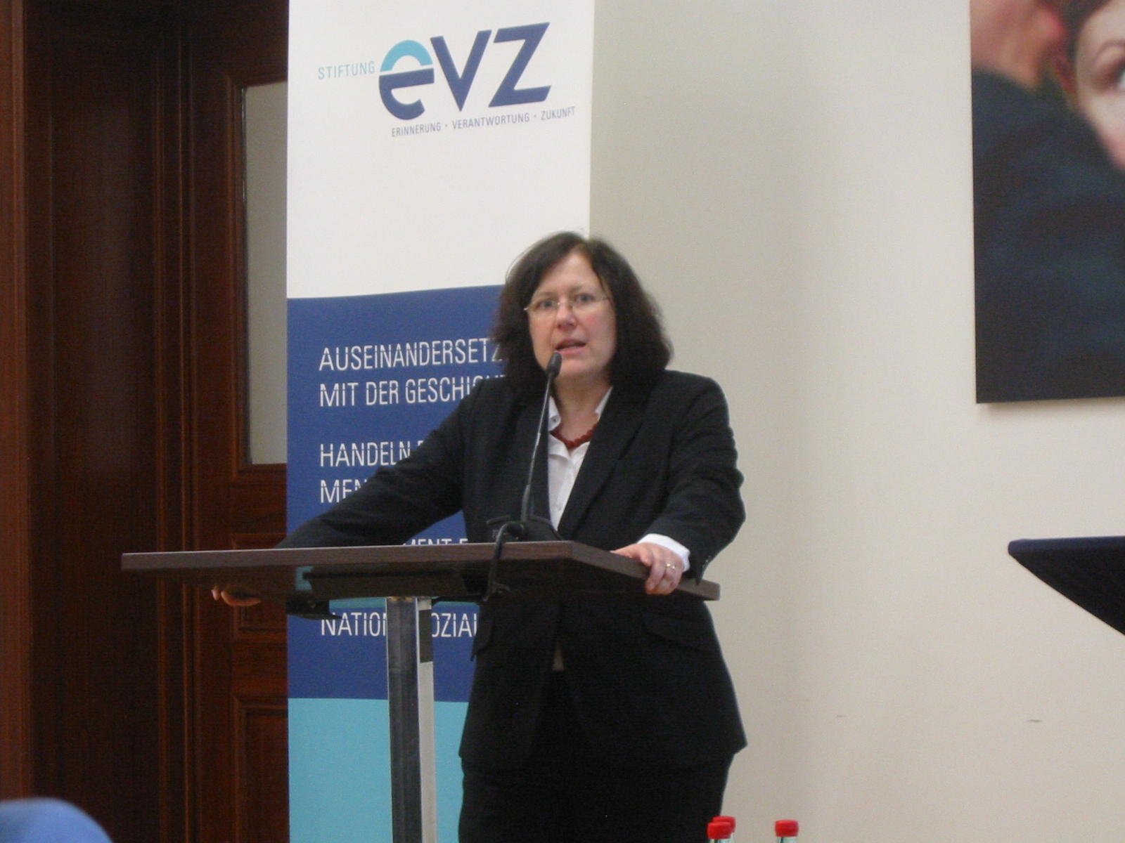 Prof. Dr. Beate Rudolf auf einer Veranstaltung der Stiftung EVZ im Mai 2013 in Berlin